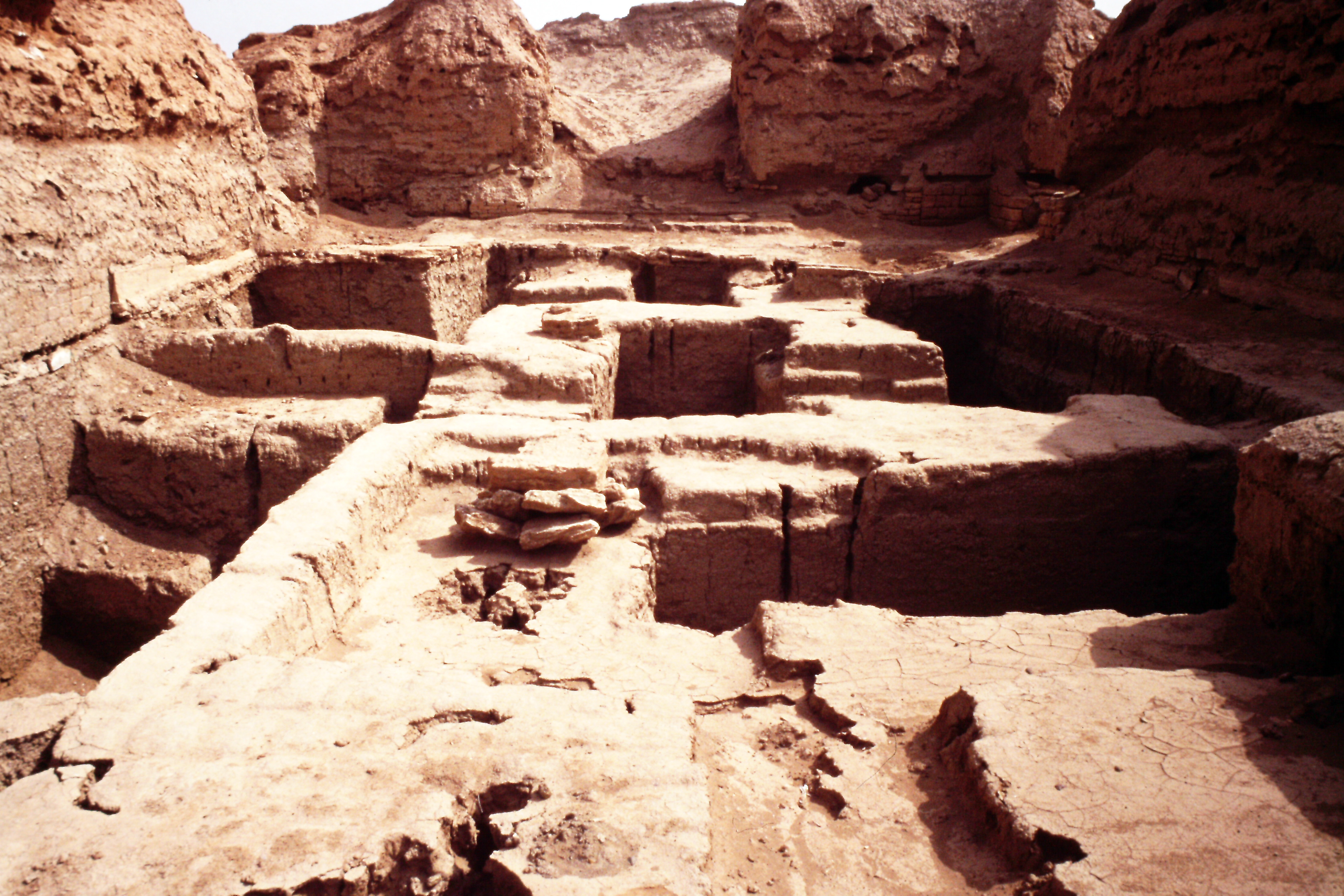 Mari, 1993